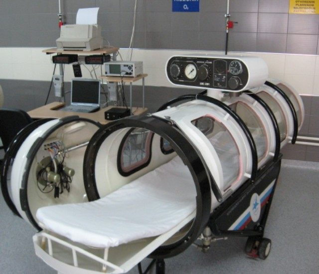 Једномесна хипербарична комора БЛКС 301М Атор др Милорад Димић спец.мед. Слика је настала у ординацији за хипербаричну медицину "Intermedic HBO" Ниш